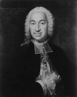 Prof. Ludwig Conrad Smalcalder (1696-1774), Gemälde in der Tübinger Professorengalerie